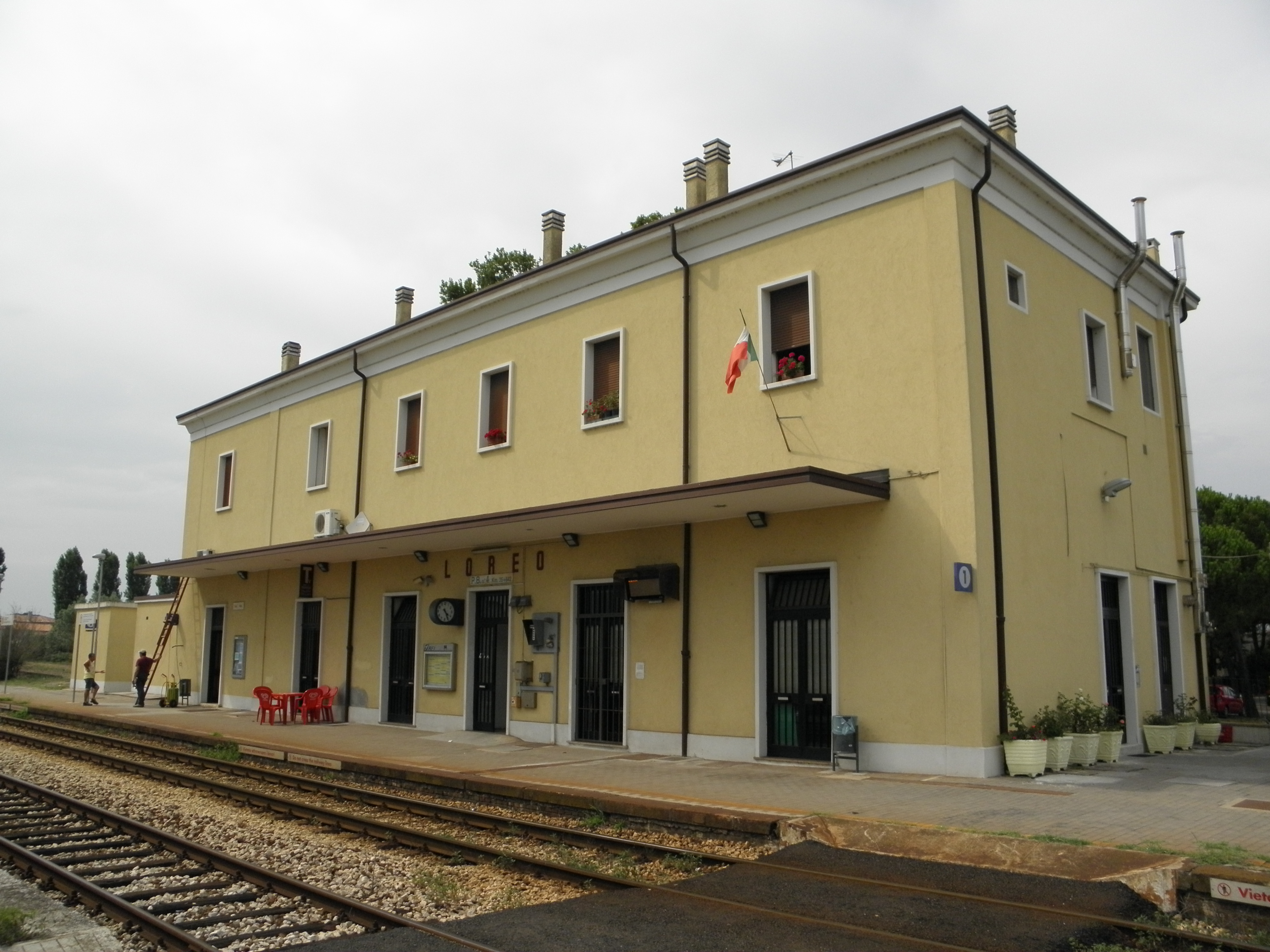 Loreo, stazione ferroviaria: il fabbricato viaggiatori lato binari.